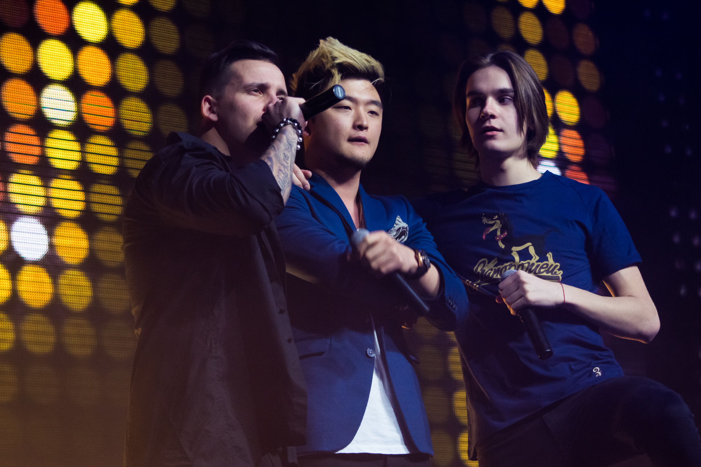 Группа MBAND на концерте «Девичник Teens» в Известия Hall